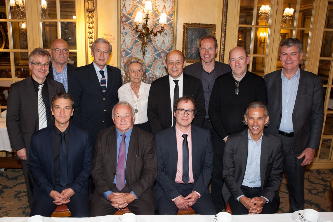 Le jury du 12e Prix Jacques-Godet-Trophée Carrefour, en 2016.